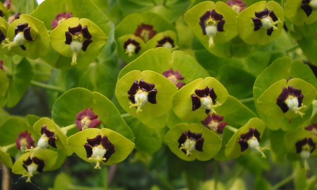 Euphorbe, détail de la fleur, , Jardin alpin, Jardin des Plantes de Paris